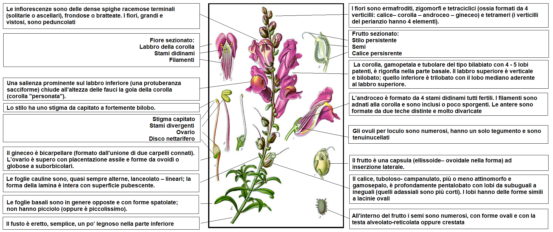 Illustration Antirrhinum majus0